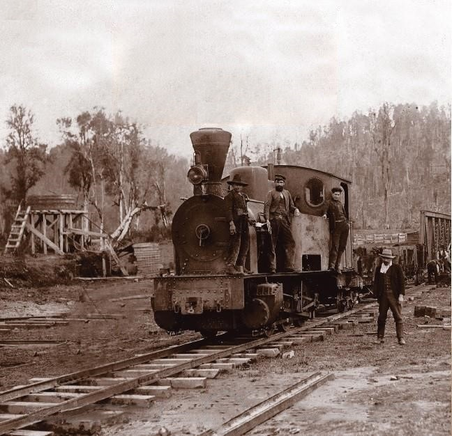 Ferroviarias en torno al tramo Valdivia – Los Lagos – Antilhue